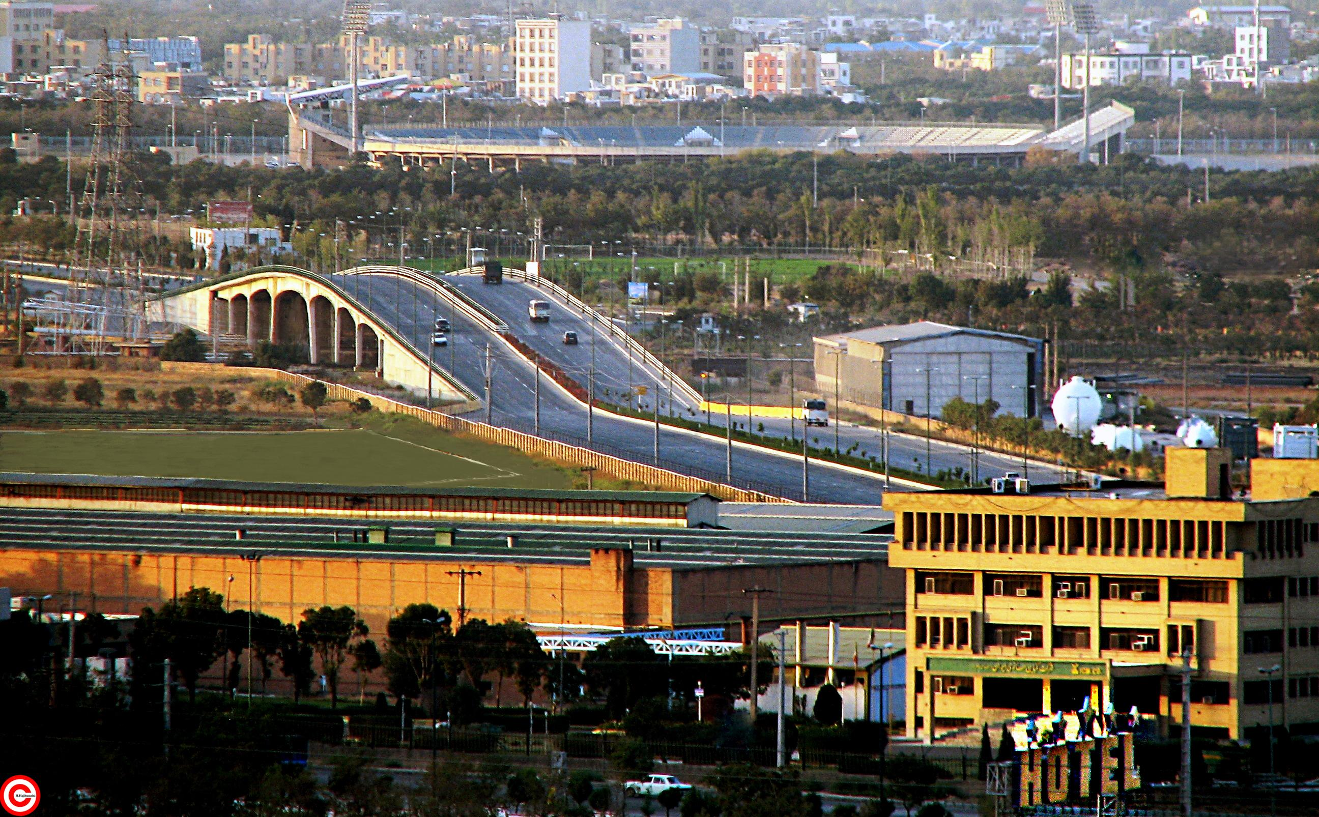 ورودی اراک،پل بختیاری و استادیوم 15000نفری در یک نگاه